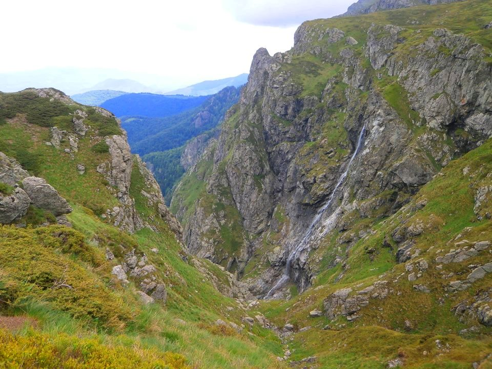 Северен Джендем